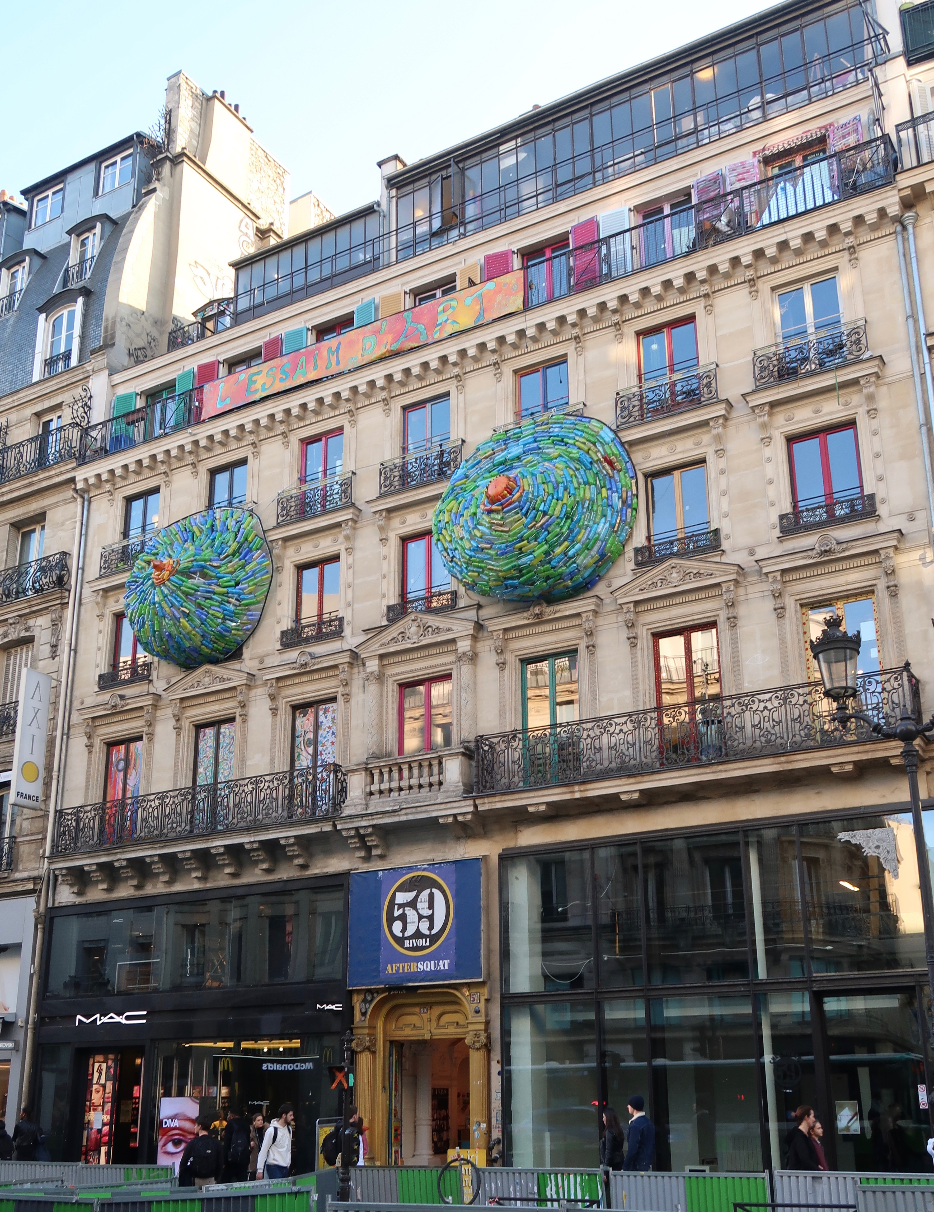 59 rue de Rivoli (Paris, 1er).